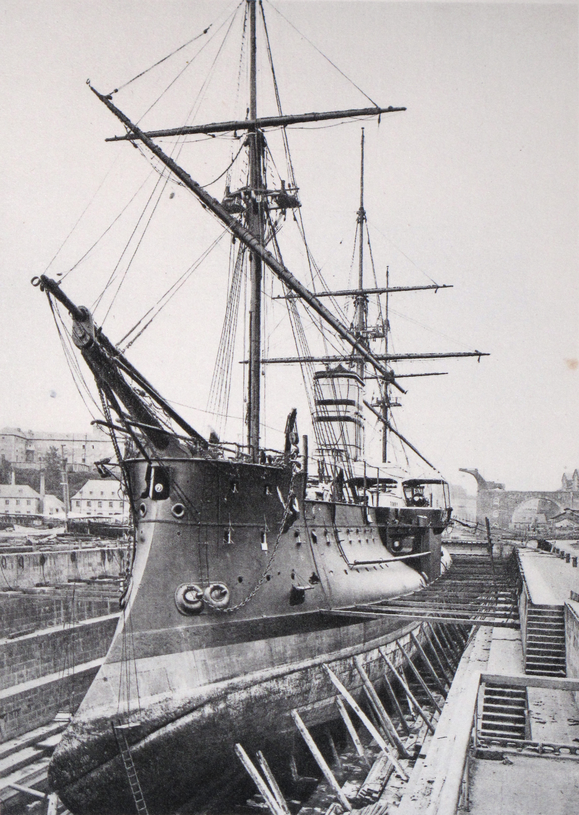 Le cuirassé Le Redoutable en cale sèche à Brest French battleship Redoutable